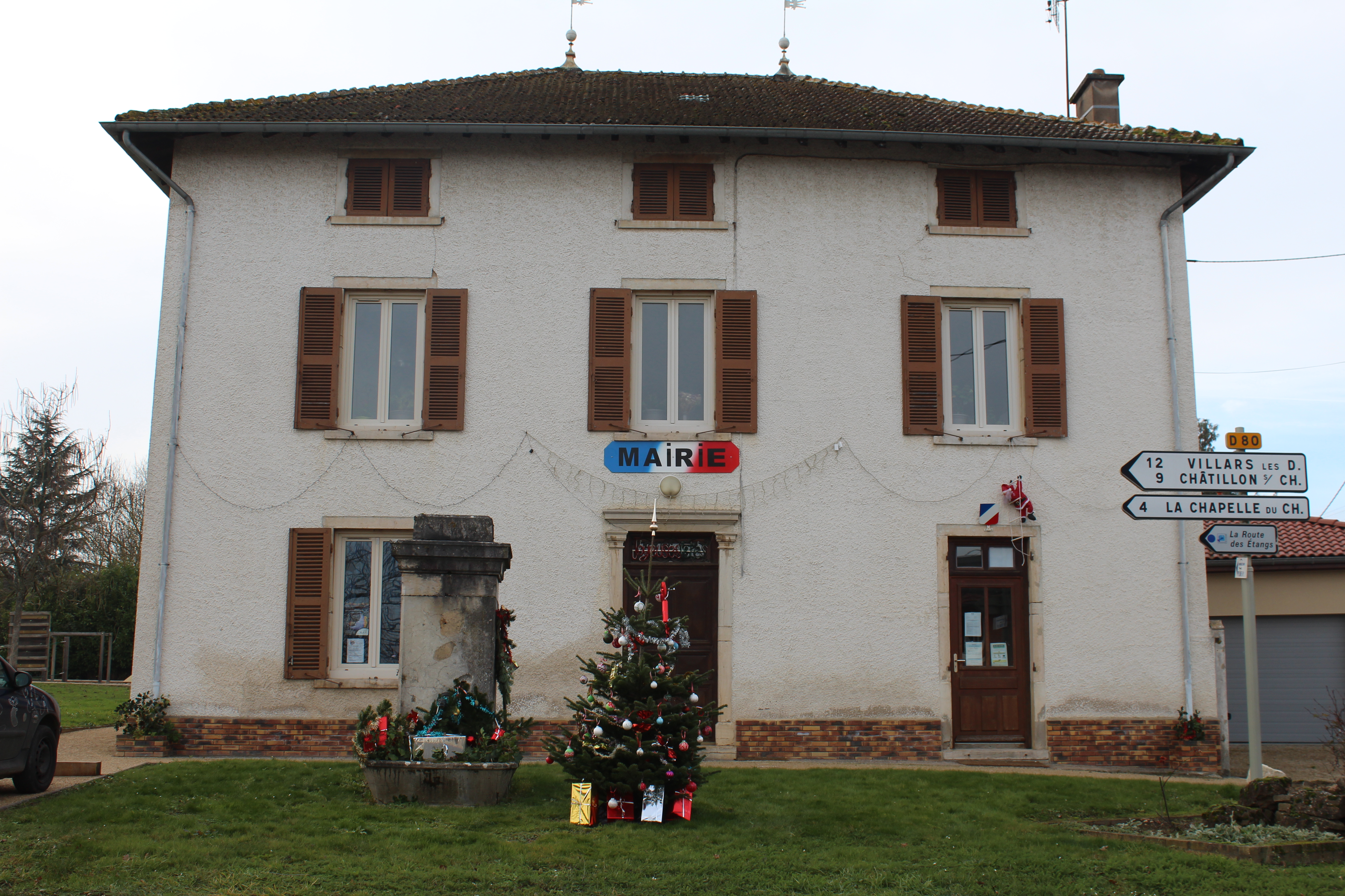 Mairie de Saint-Georges-sur-Renon.